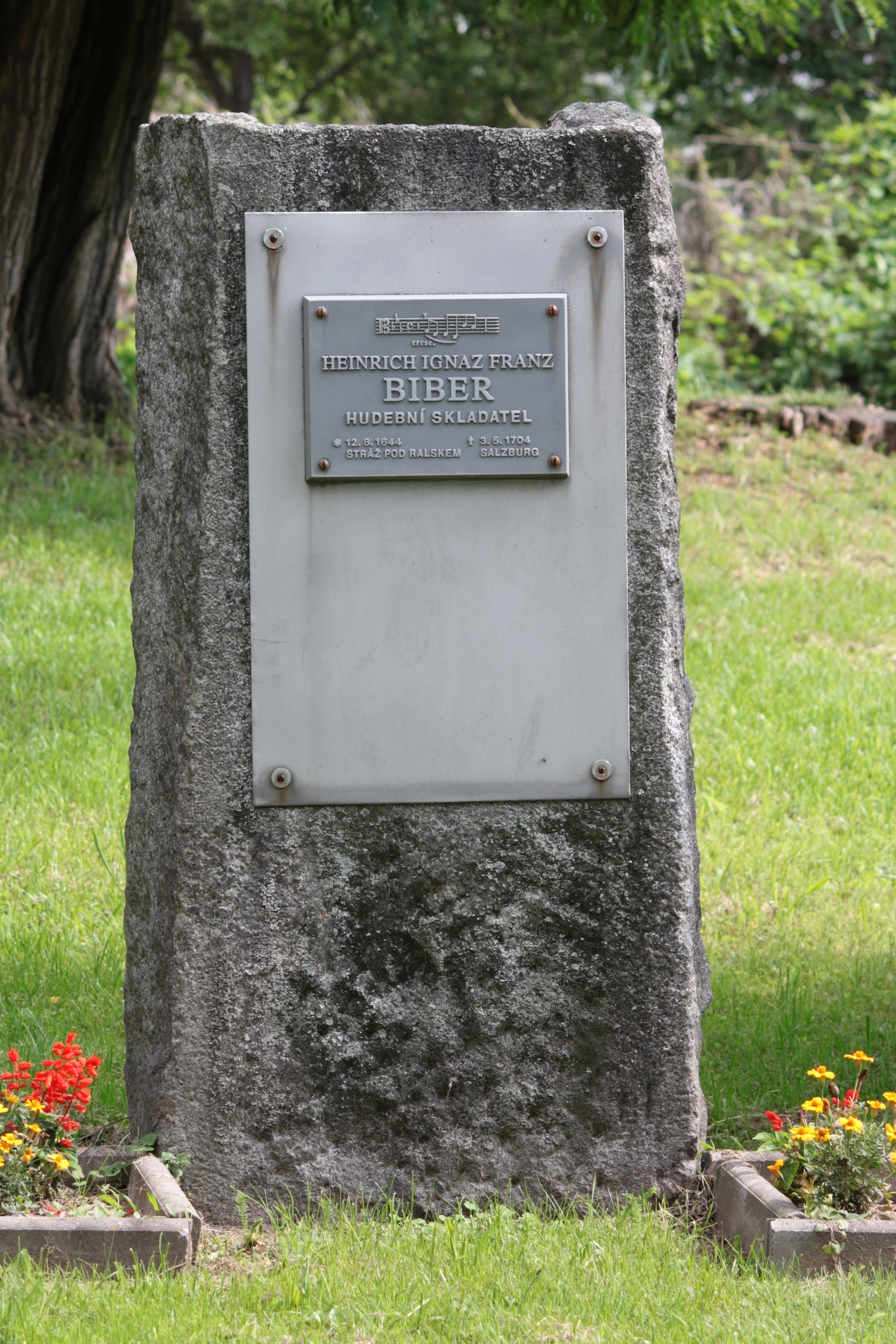 Stráž pod Ralskem, pomník hudebního skladatele Heinricha Bibera